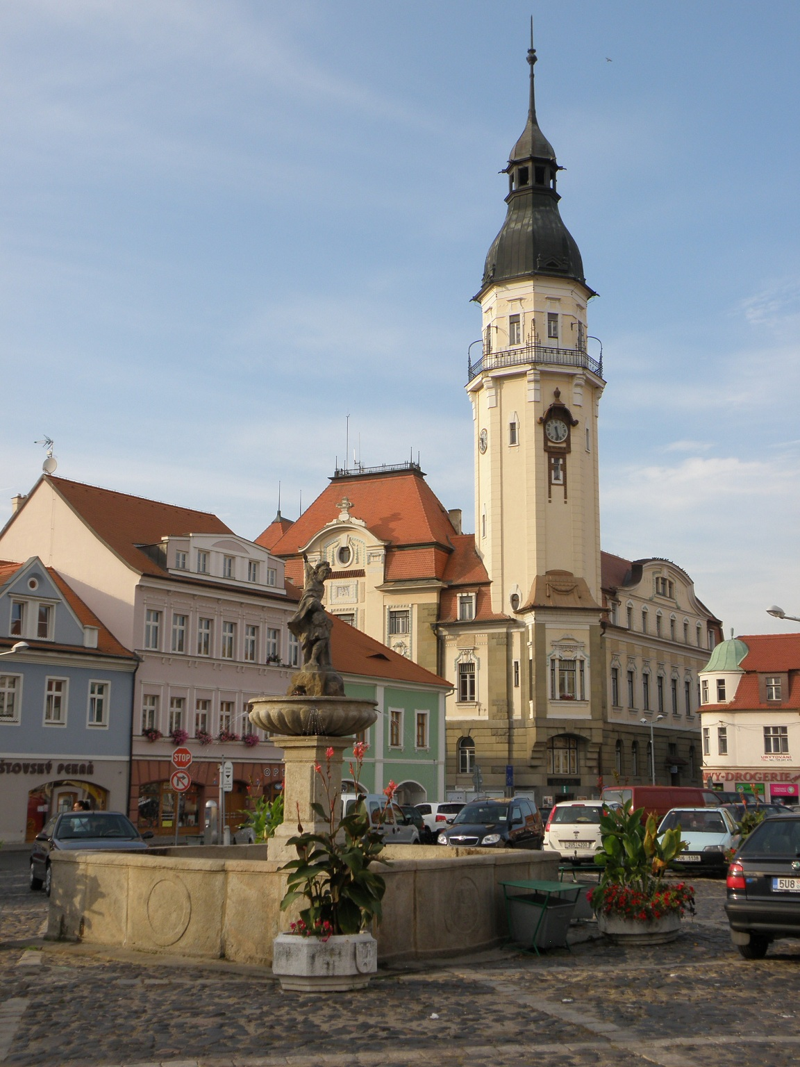 Radnice (Bílina) a náměstí, Břežánská, Želivského 50/4, Bílina